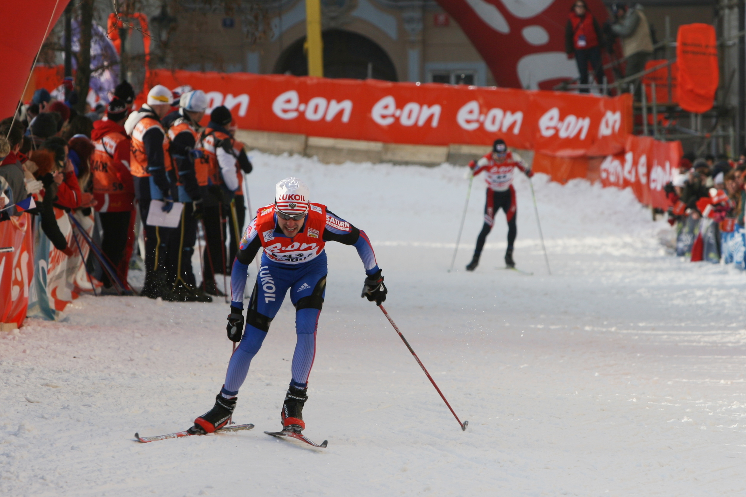 Nikolai Pankratov (Николай Владимирович Панкра́тов) in the qualification of Tour de Ski in Prague